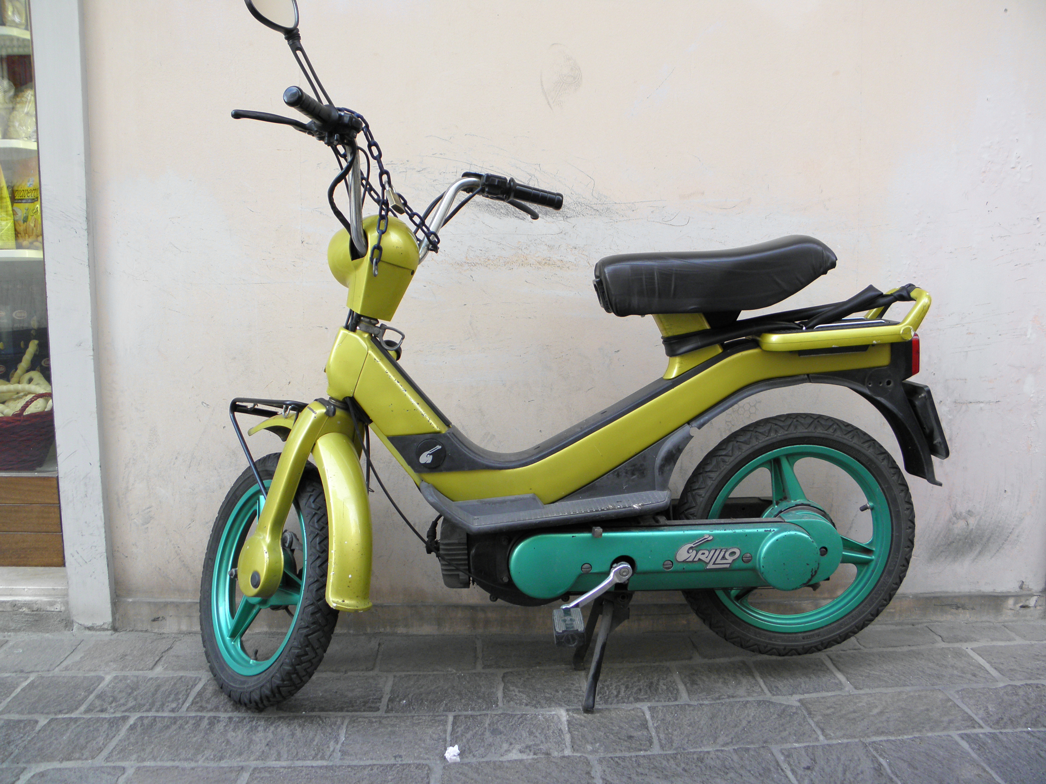 Un ciclomotore Piaggio Grillo fotografato a Rovigo.